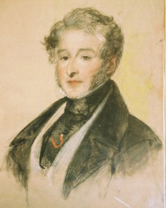 George Rice, 3rd Baron Dynevor (1765-1852)